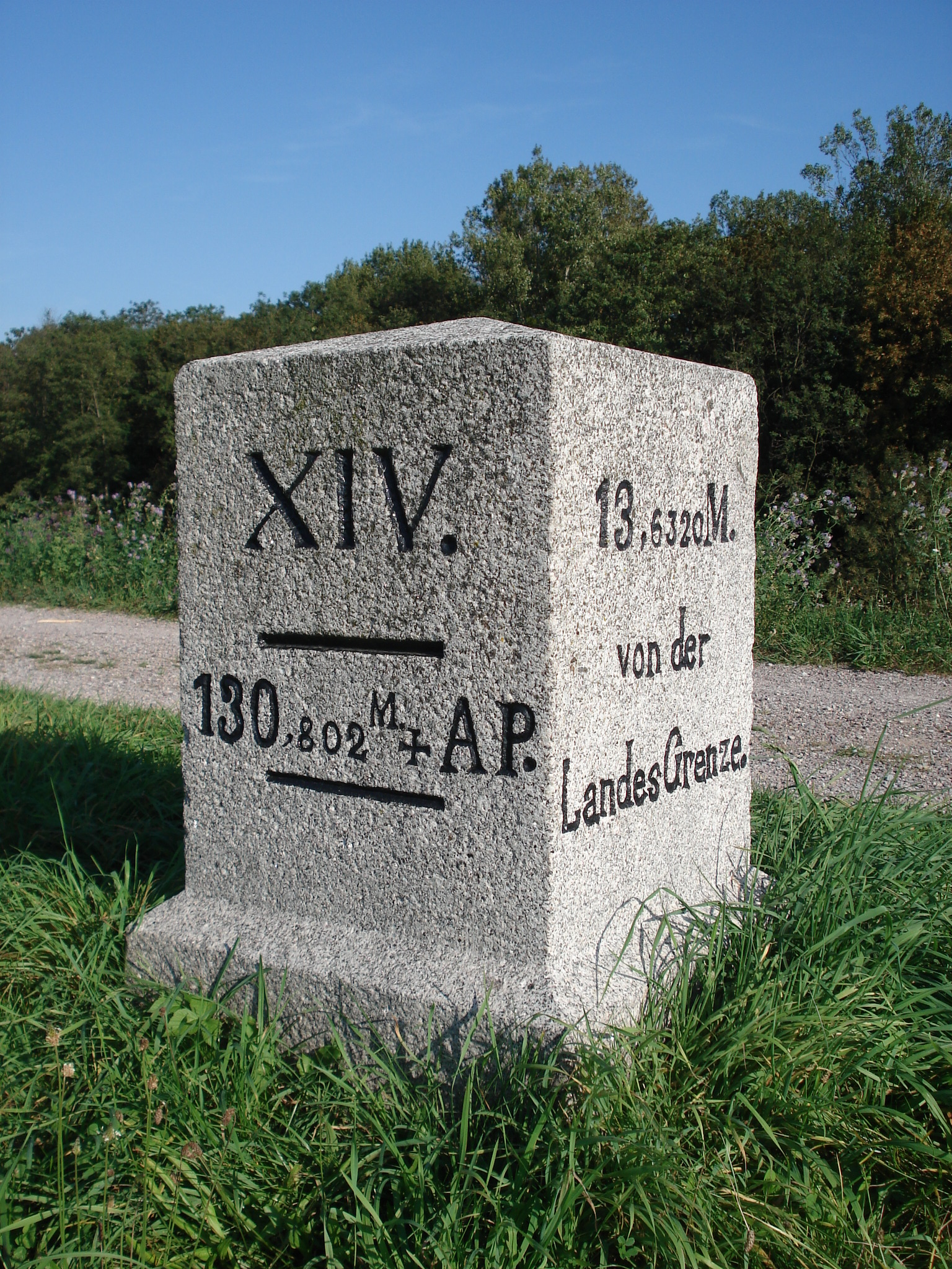 Myriameterstein 14 (rechtsrheinisch) in Rheinau